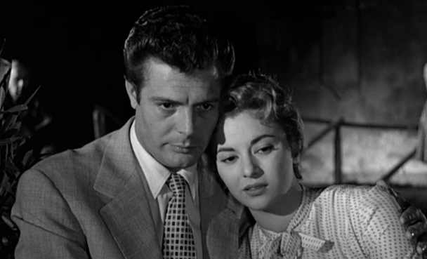 Marcello Mastroianni e Giovanna Ralli, screenshot da Il momento più bello (1957) catturato personalmente